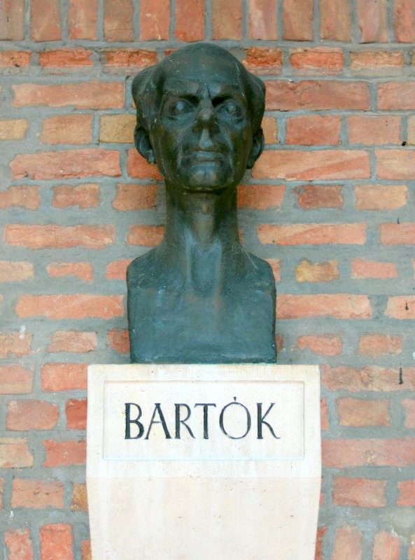 Bartók Béla portrészobra Szegeden a Nemzeti Emlékcsarnokban a Dóm tér nyugati oldalán. A szobor Makrisz Agamemnon alkotása.